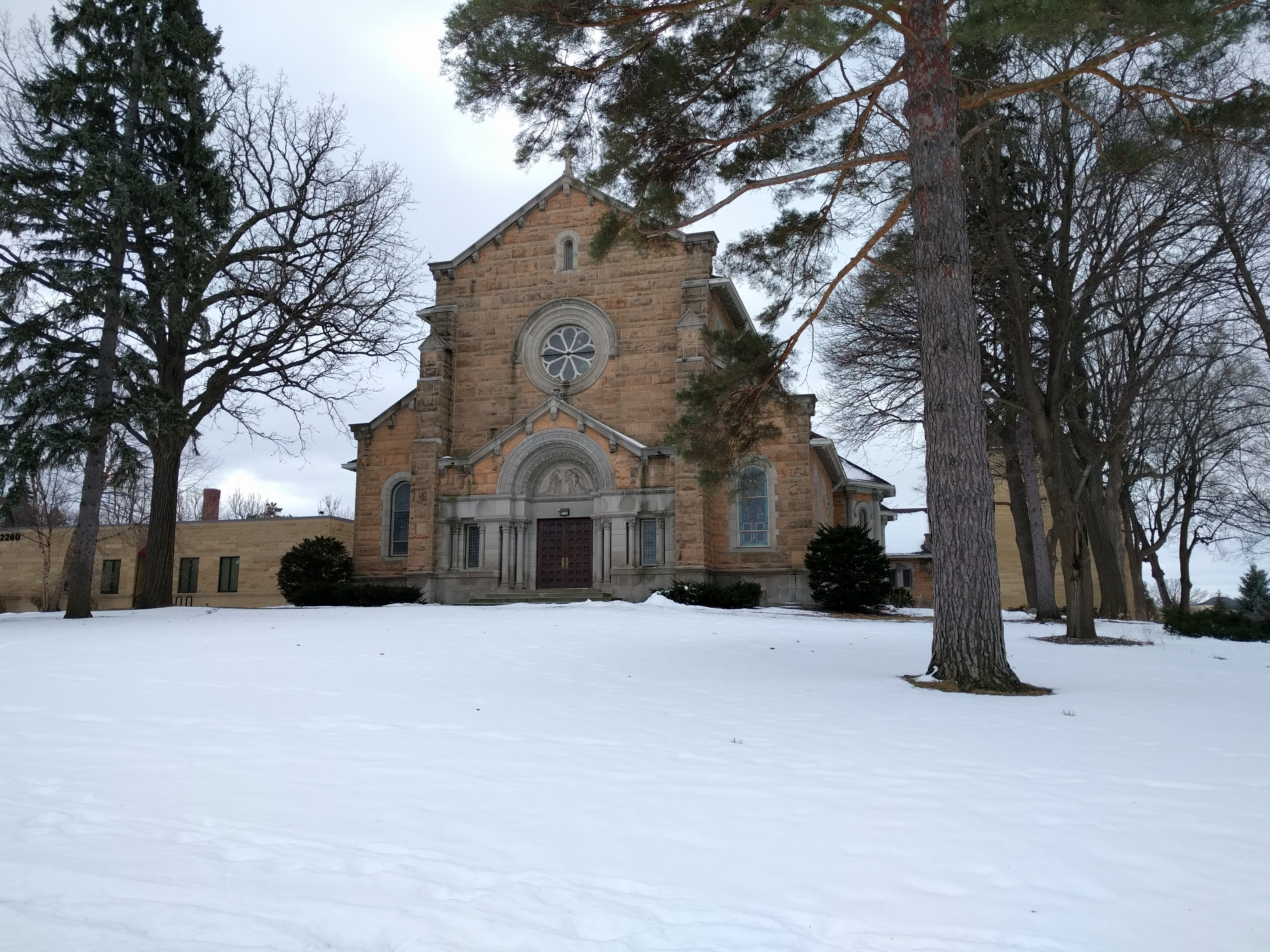 Saint Paul, Minnesota